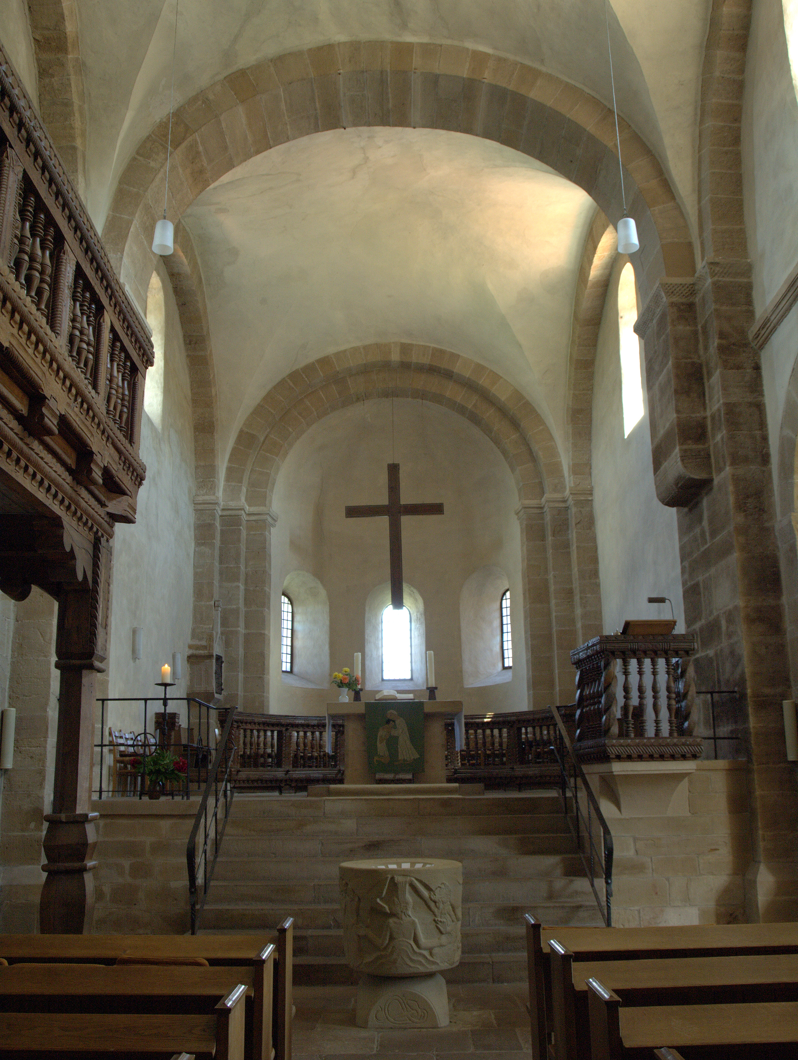 Altarraum der Klosterkirche Germerode